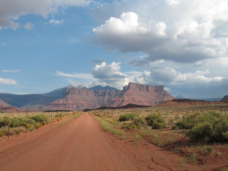 Moab Utah roadtrip